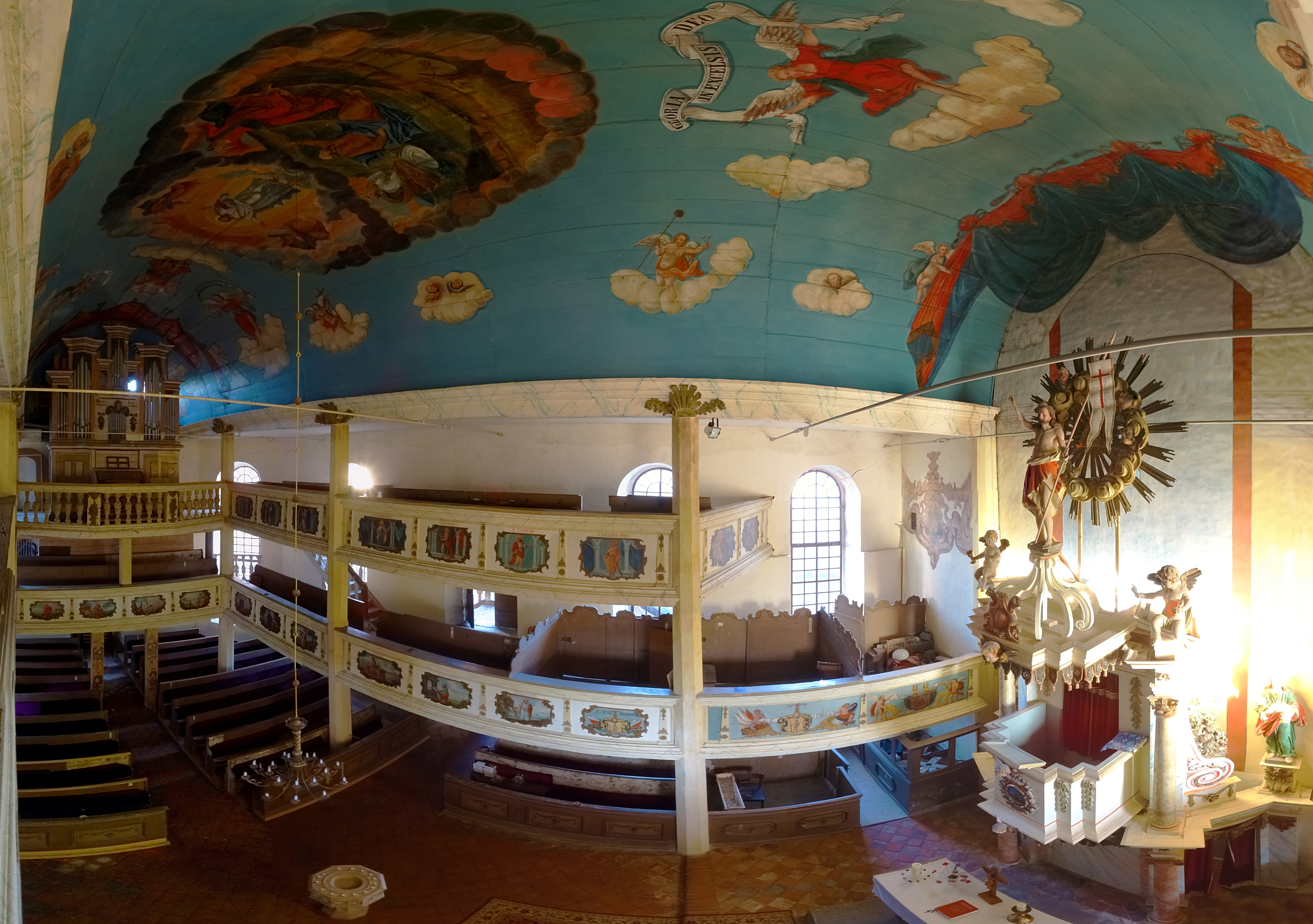 Innenraumpanorama St. Martinus (Westgreußen). Die von Außen zugänglichen Emporen tragen Felder mit den Familienwappen der Gutsbesitzer ( von Selmnitz bis von Dacheröden).